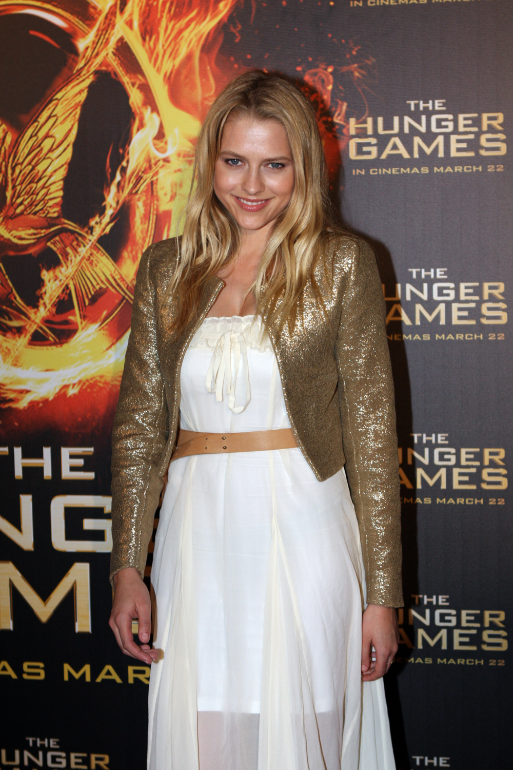 Teresa Palmer at The Hunger Games Sydney Premiere